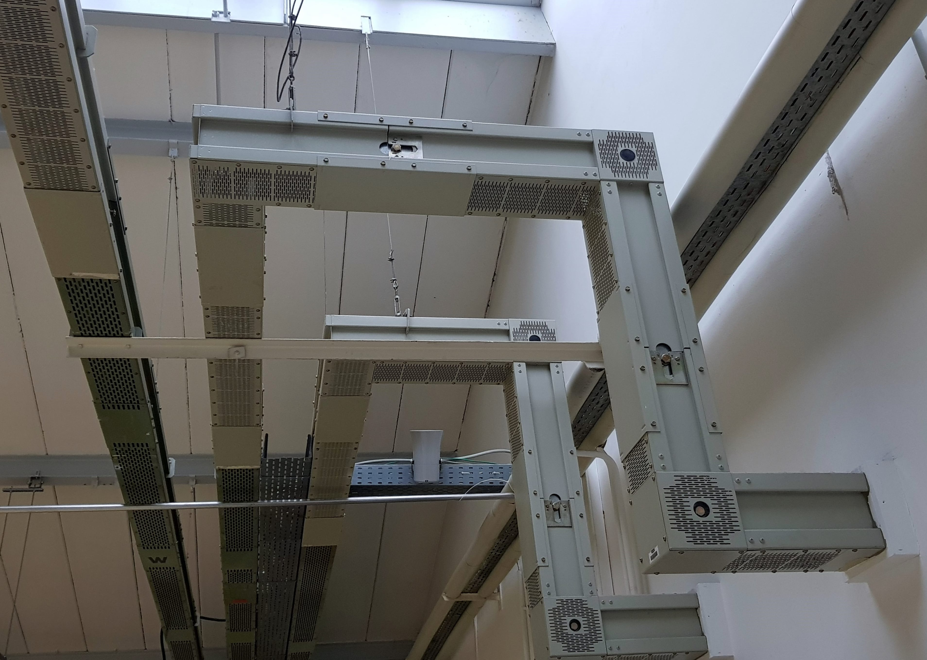 Schienenverteilersysteme, die durch einen Brandschutz geführt wurden